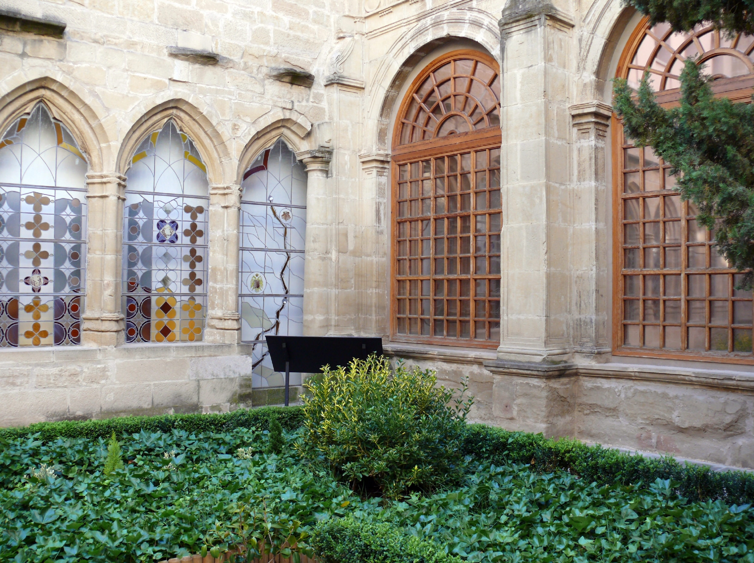 Vista del interior del patio.